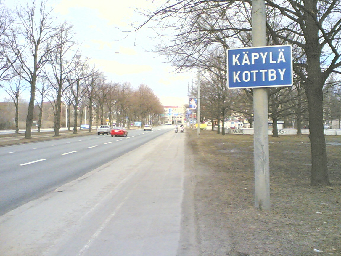 Käpylä Helsinki sign